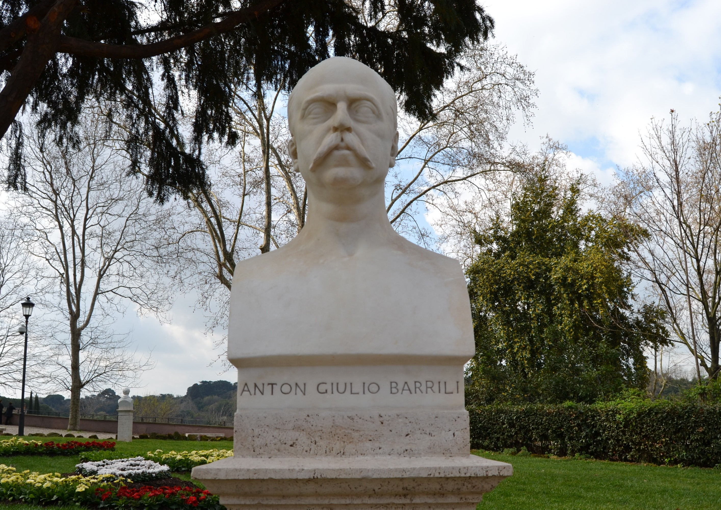 Busto restaurato di Anton Giulio Barrili